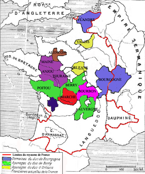 Cartes des apanages sous le roi Charles VI. Ont été regroupés les apanages des ducs de Berry, de Bourgogne, d'Orléans. Les autres apanages sont représentés par des couleurs différentes et par leur noms. Source : Alexandrin